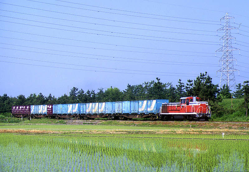 新湊線 173列車 能町〜新湊（当時 現高岡貨物）